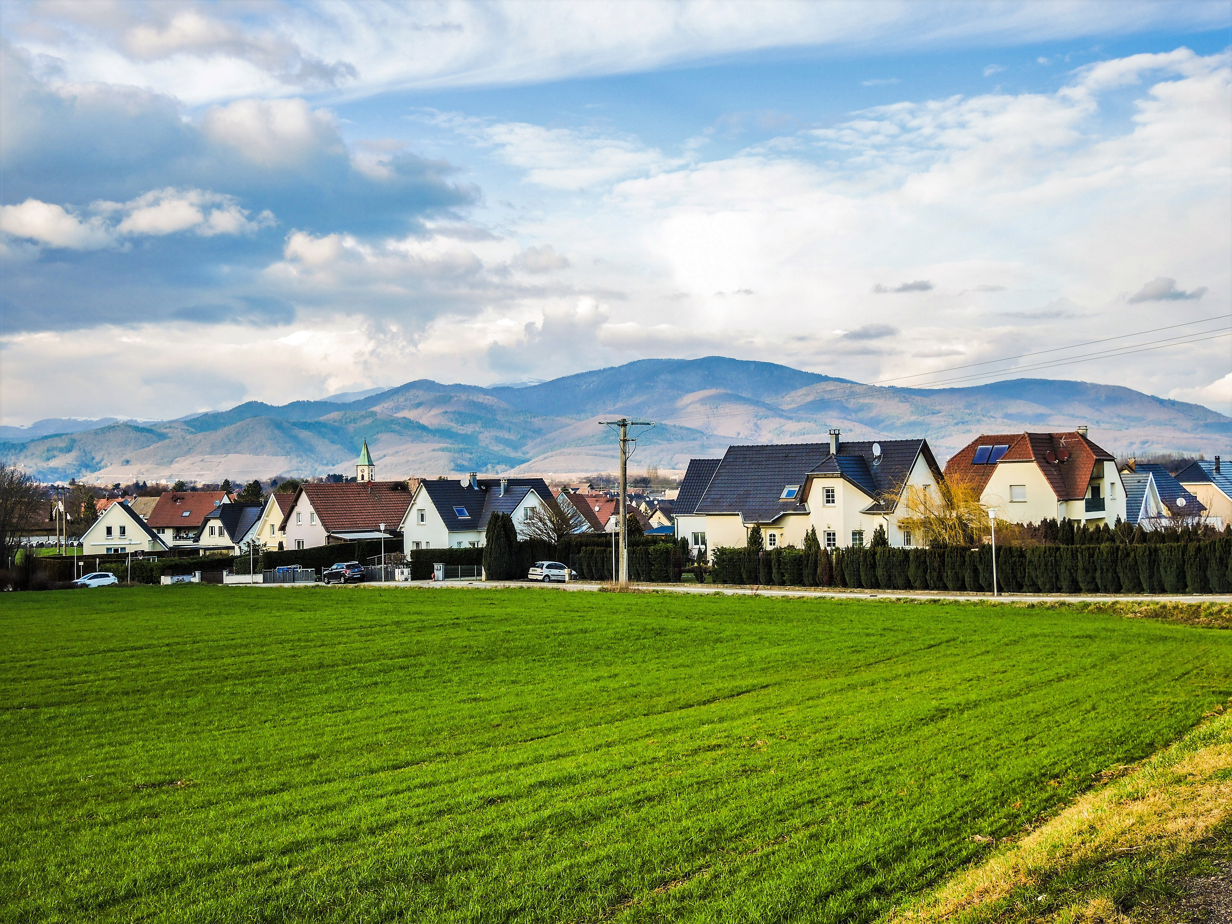 Village d'Aspach-le-Bas, vu du calvaire. Haut-Rhin.